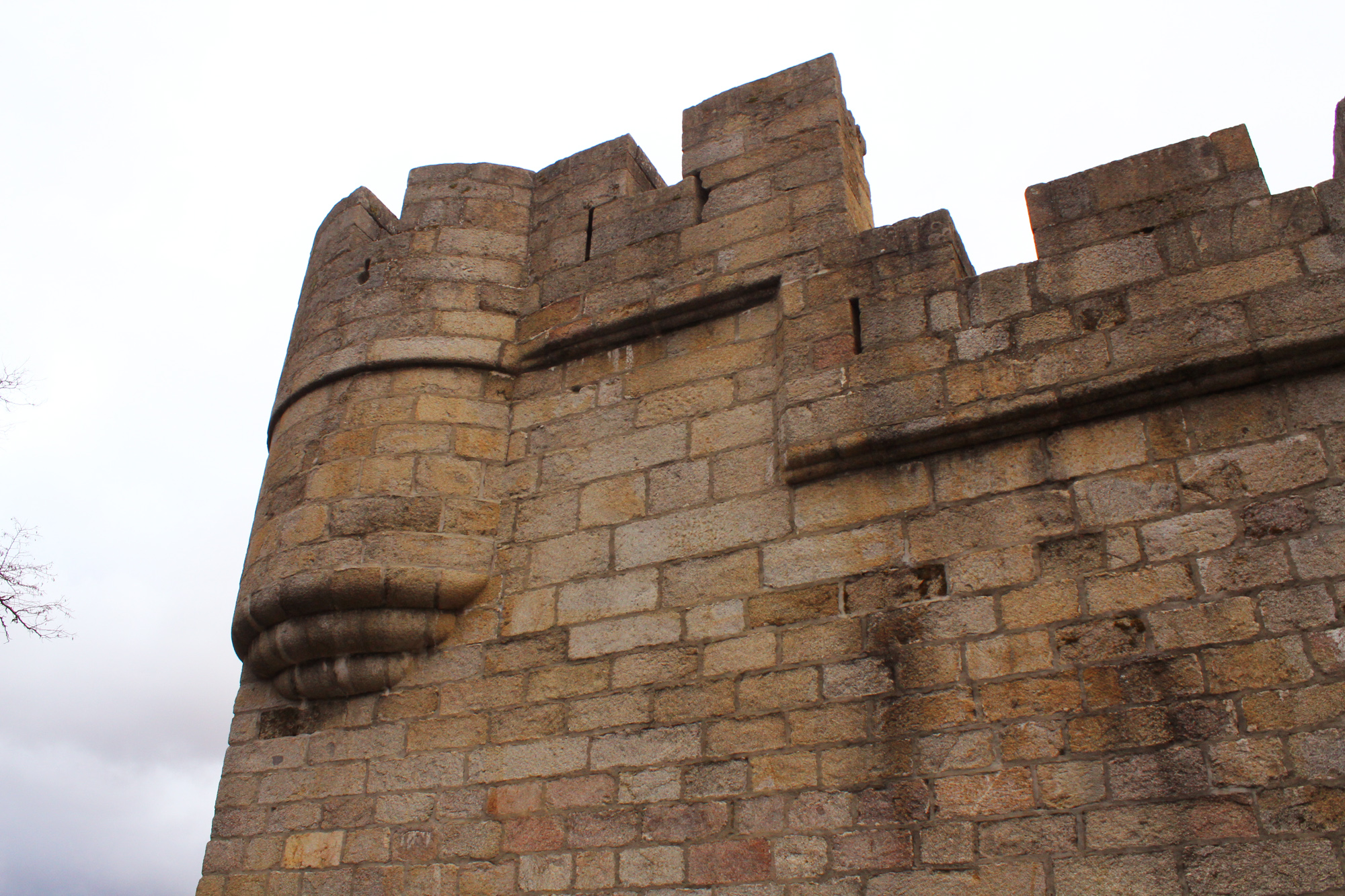 Castle of Puebla de Sanabria